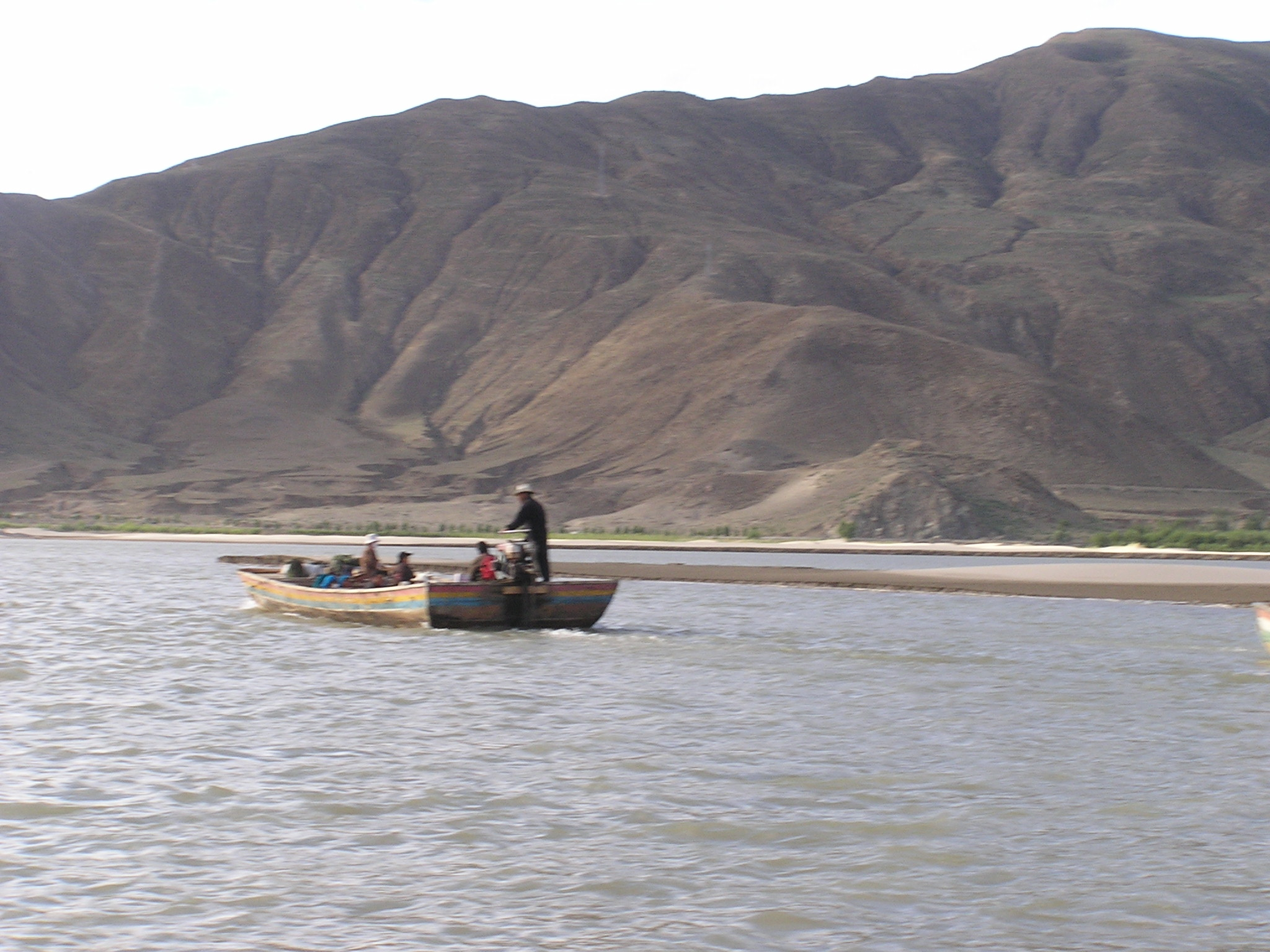 Brahmaputra 8